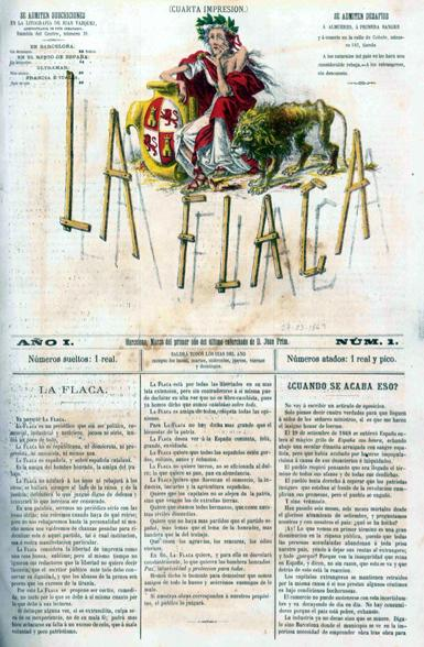 Portada número 1 o del primer año de la revista satírica La Flaca (siglo XIX, España).